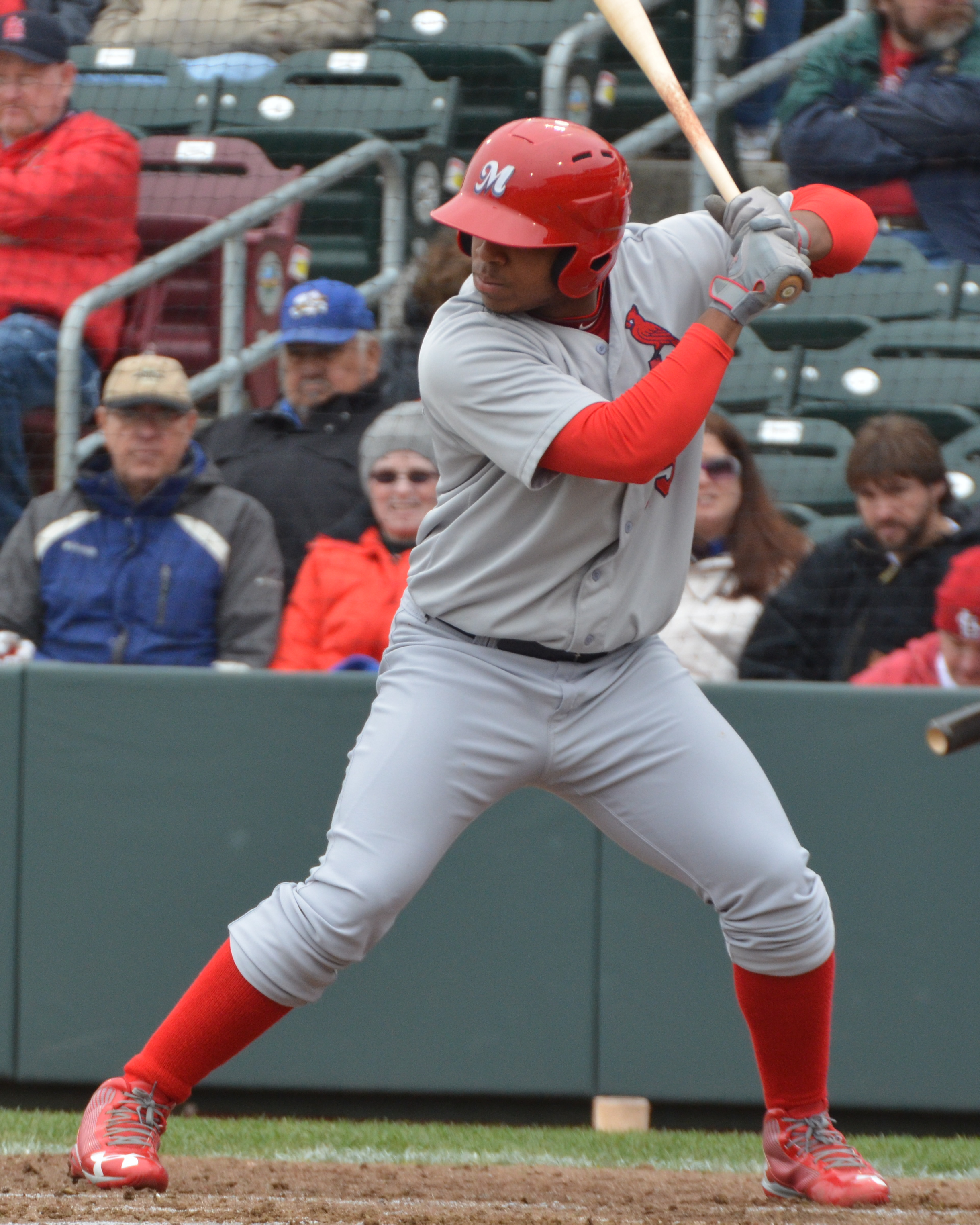 Oscar Taveras